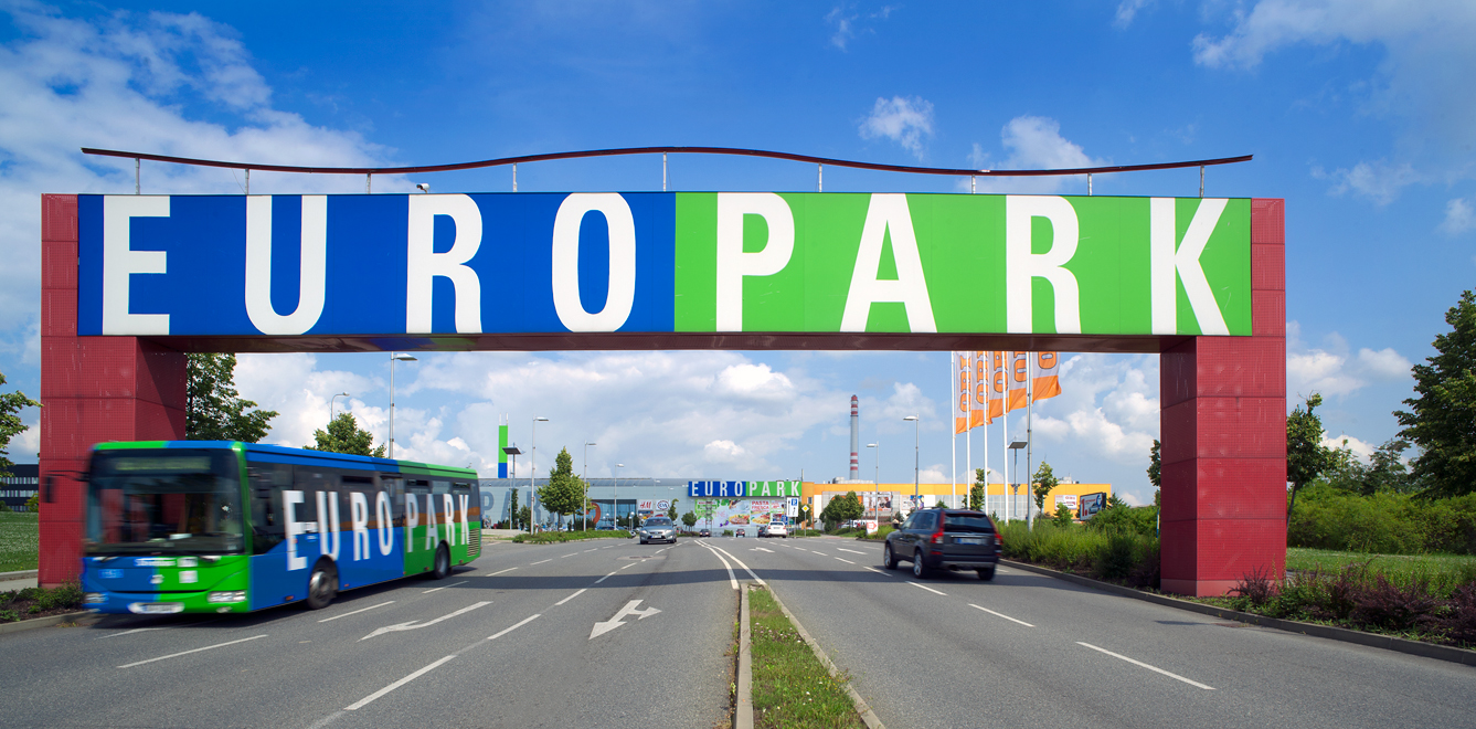 OC Europark